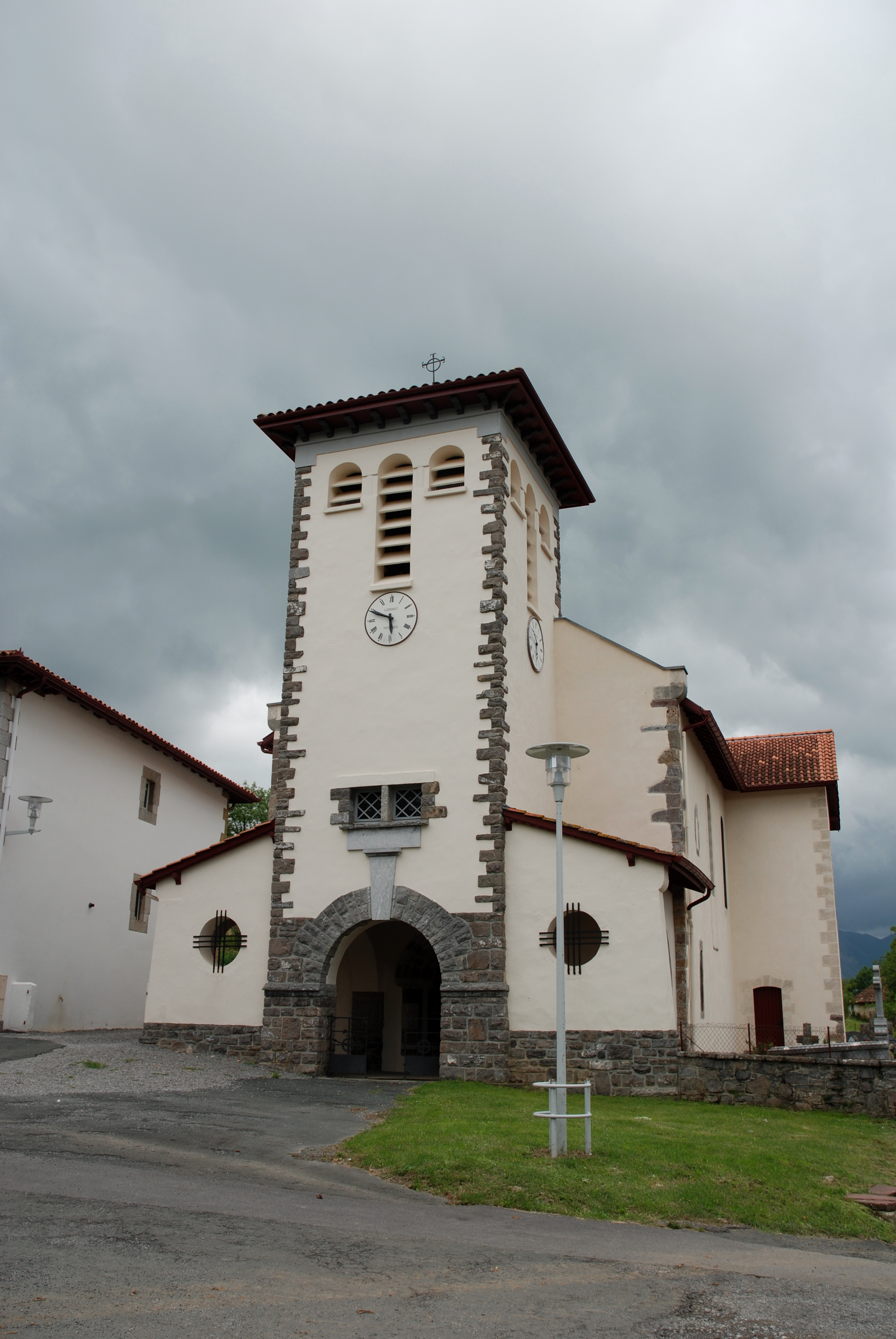 Ahaxe - Eglise Saint-Julien d'Antioche